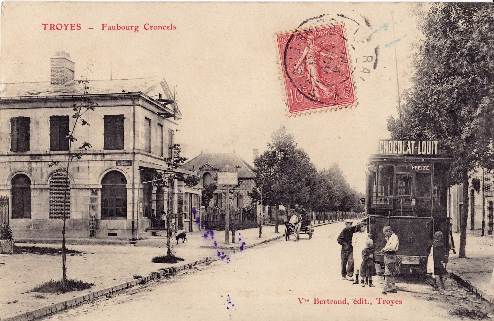 Carte postale ancienne éditée par Veuve Bertrand à Troyes : TROYES - Faubourg Croncels